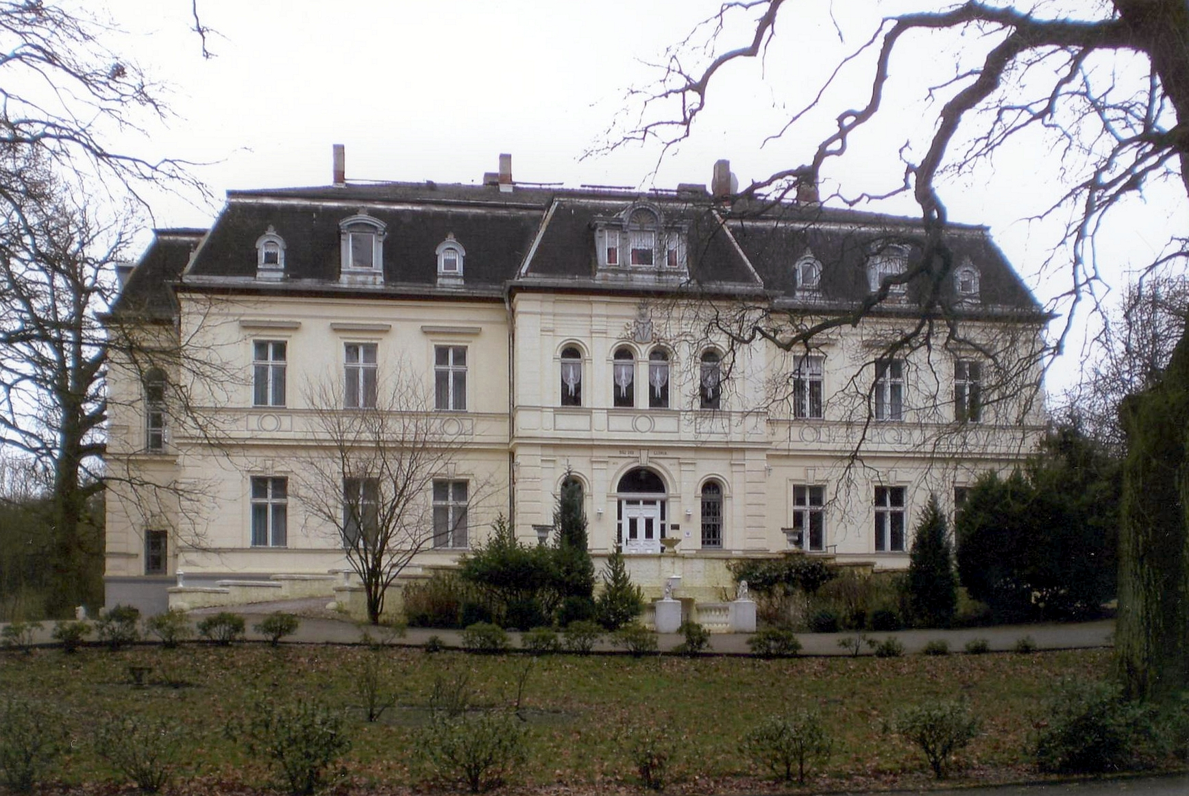 Das Schloss Schönfeld in Steinfeld-Bismark in der Altmark in Sachsen-Anhalt.